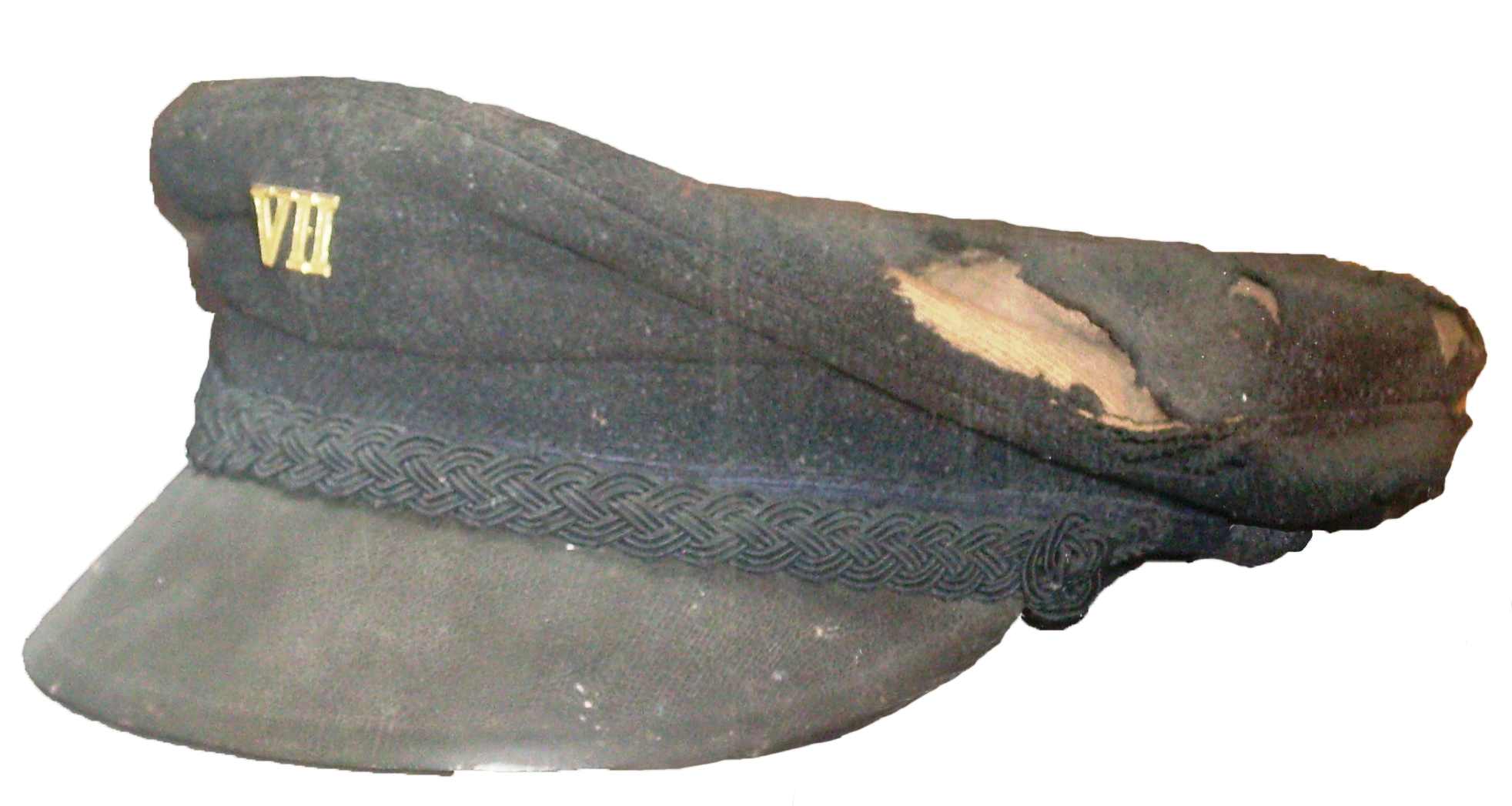 Srpski (latinica): Đačka kapa, prva polovina XX veka. Kapu su nosili učenici Gimnazije u Leskovcu. Na prednjoj strani je oznaka razreda.